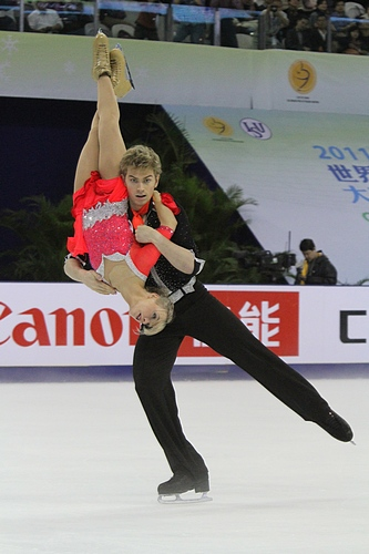 Пенни Кумс и Николас Бакленд на Кубке Китая 2011